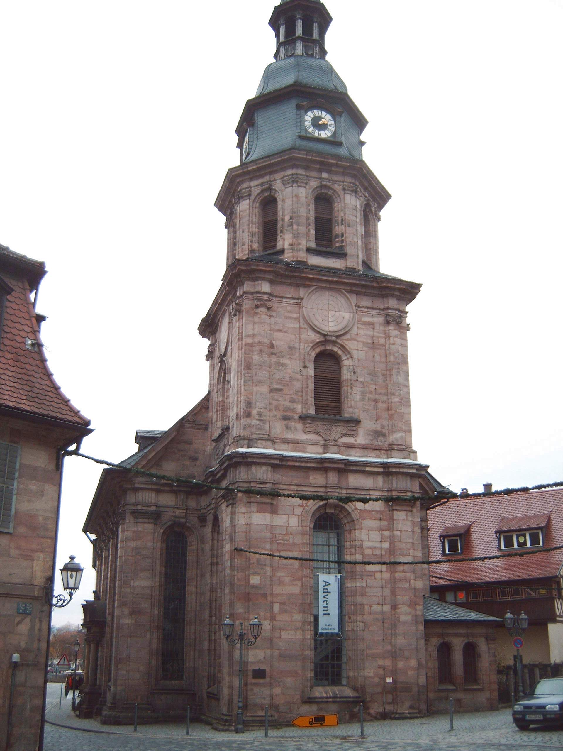 Spitalkirche in Kulmbach